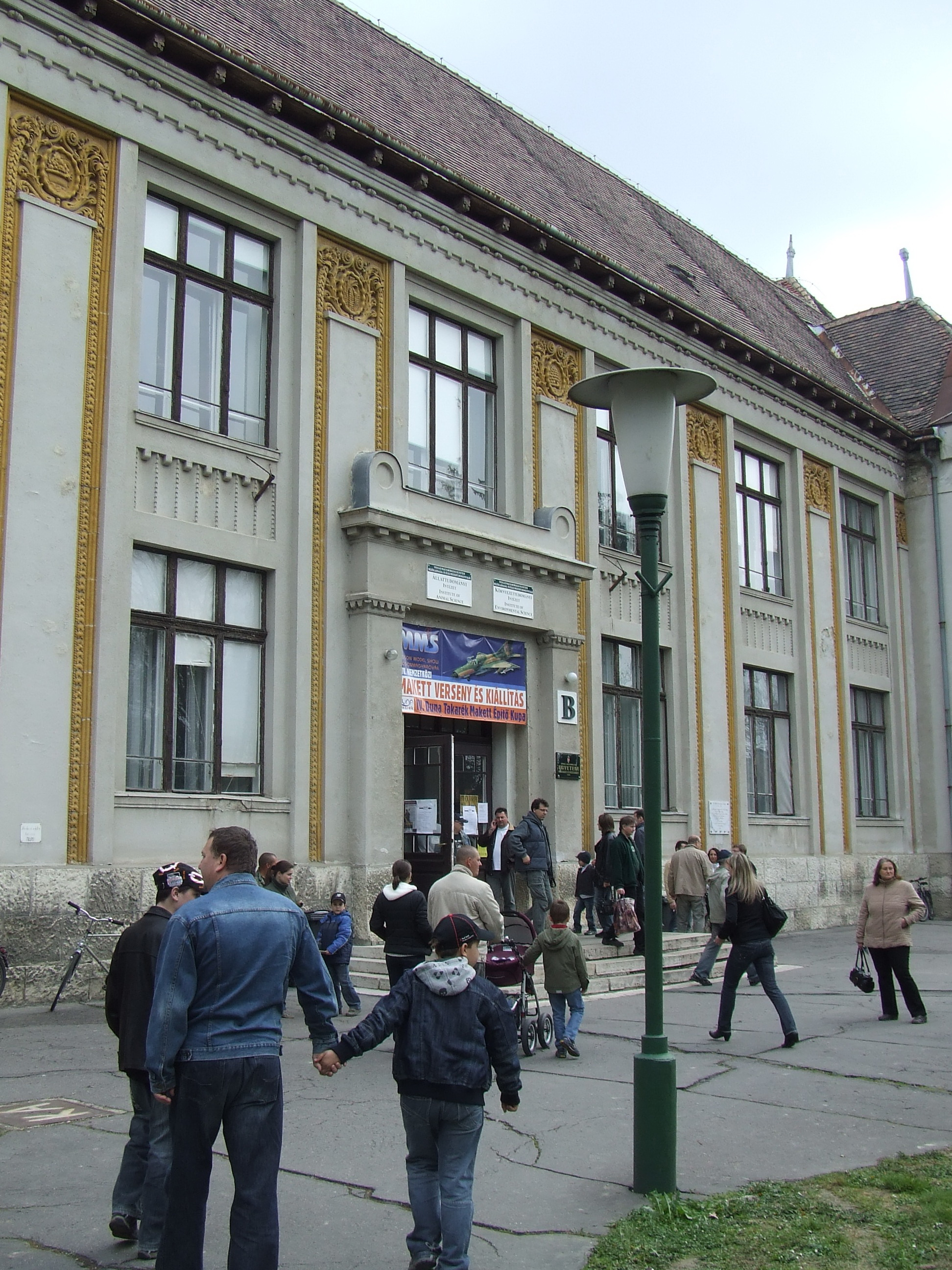 Пољопривредни факултет у Мосонмађаровару